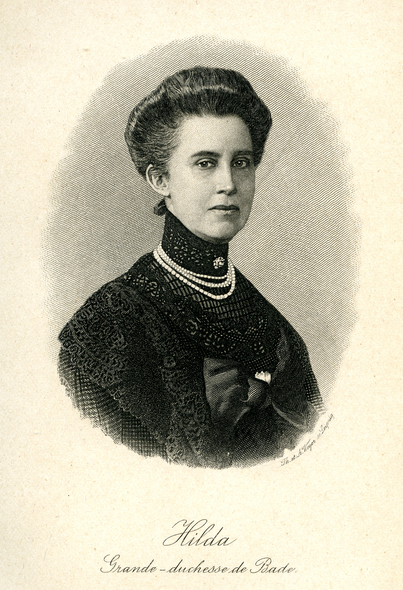 Hilda Charlotte Wilhelmine de Nassau (née le 5 novembre 1864 à Biebrich, morte le 8 février 1952 à Badenweiler)